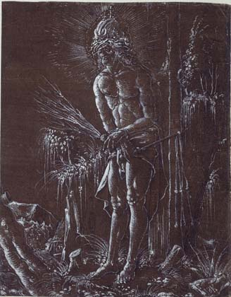 Hans Springinklee (1490-1540): Stehender Schmerzensmann, um 1514